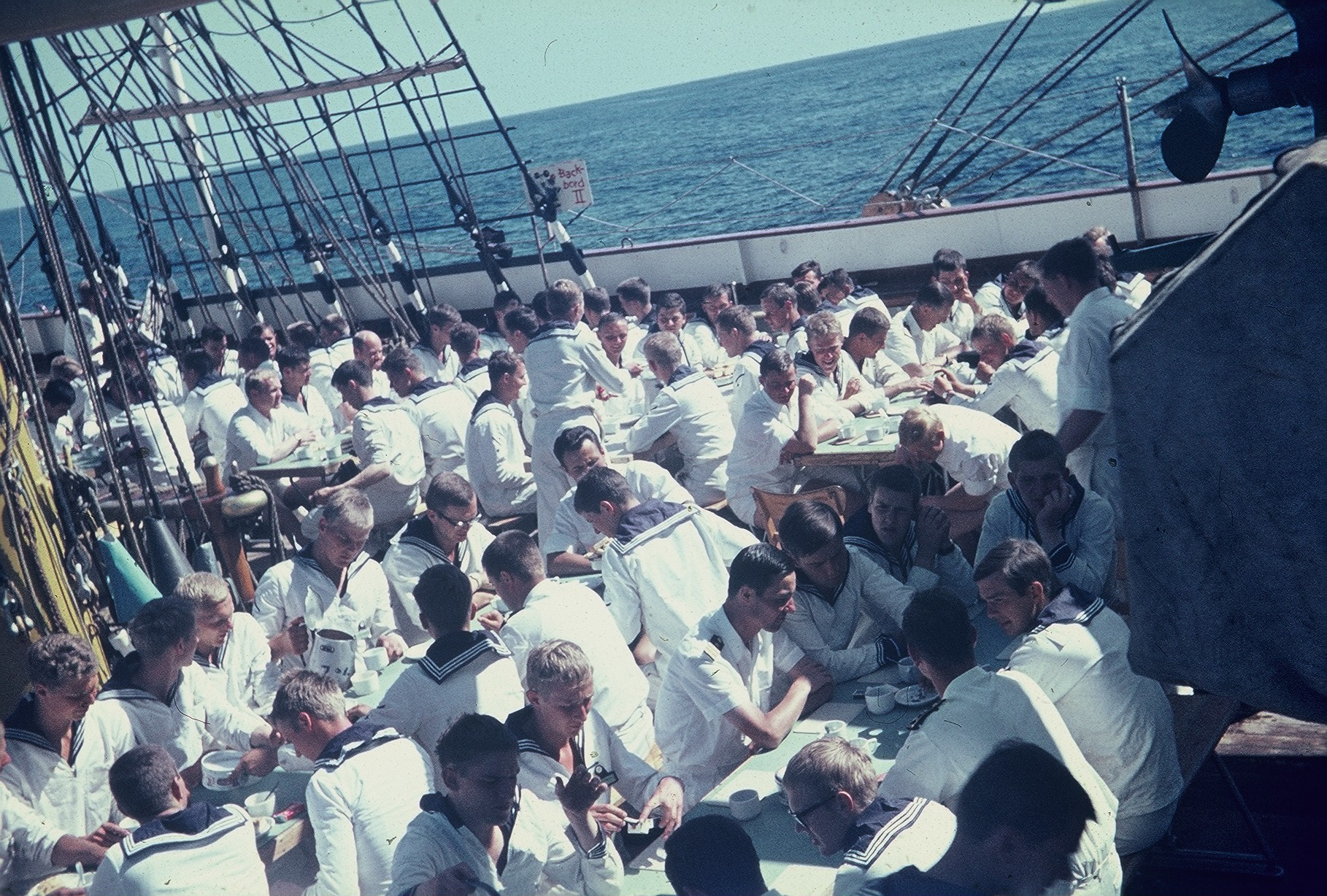 Seemannssonntag auf der Gorch Fock (1958)